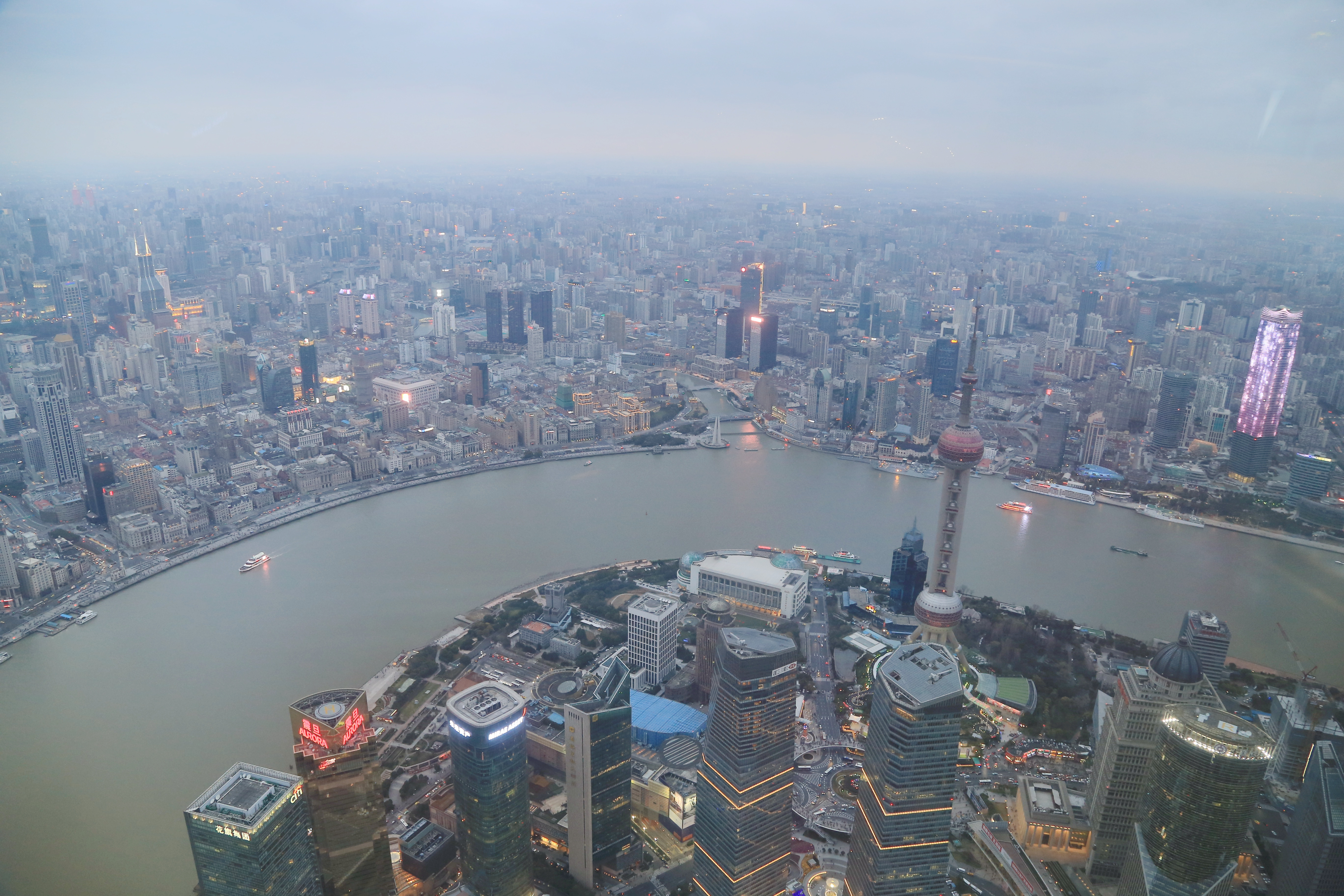 从上海中心大厦观景台眺望陆家嘴和外滩